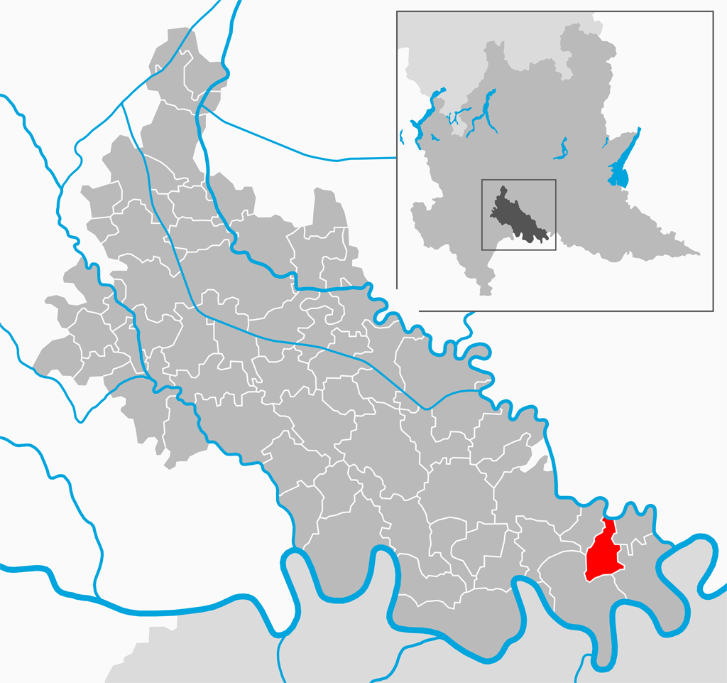 Il comune di Meleti nella provincia di Lodi